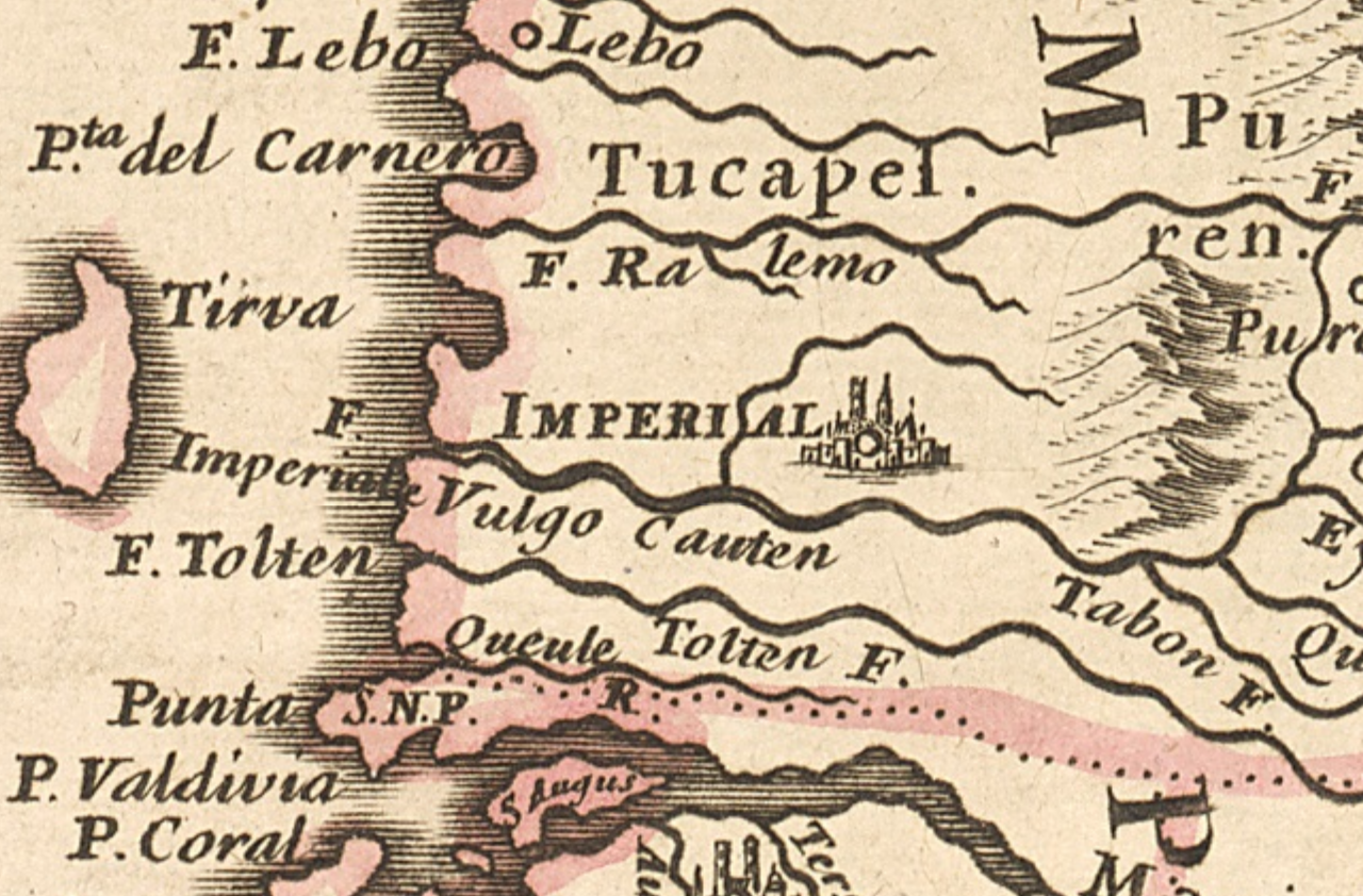 Le Chili divisé en ses treize jurisdictions tire de R. P. alfo de Qualle de la C. D. I. et de diverses relations les plus recentes